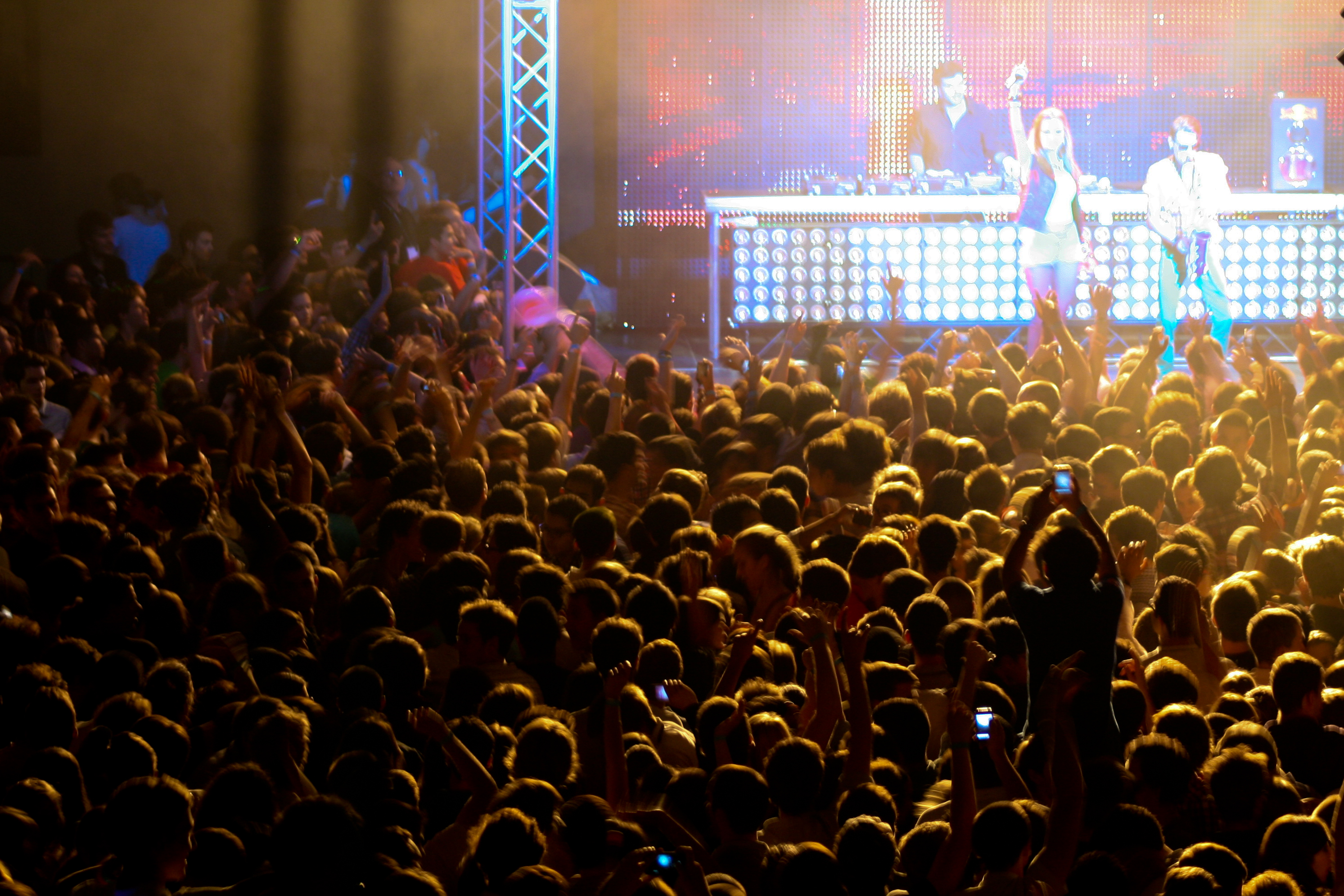 Ambiance de la scène DJ